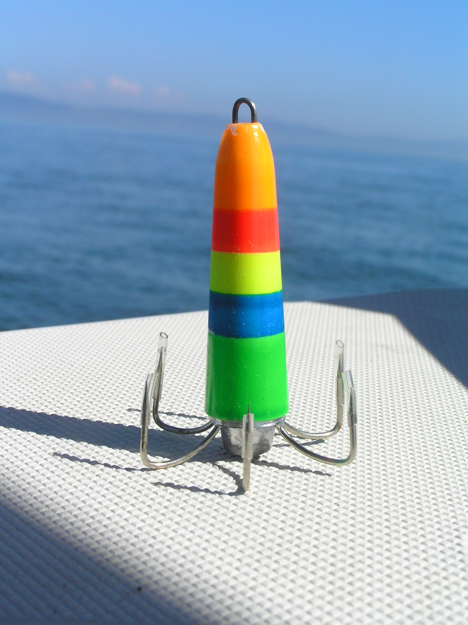 イイダコテンヤ既製品